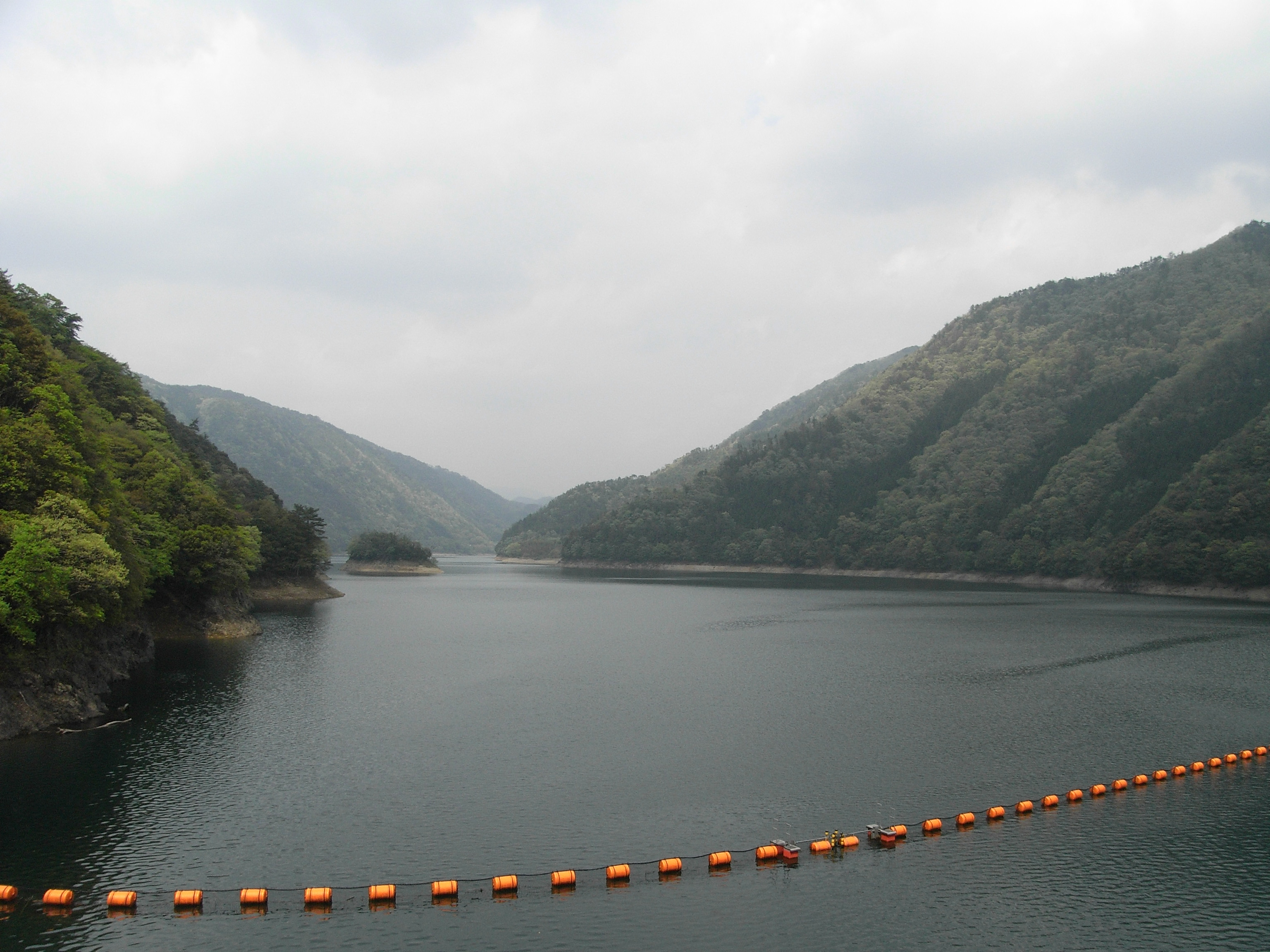 Lake